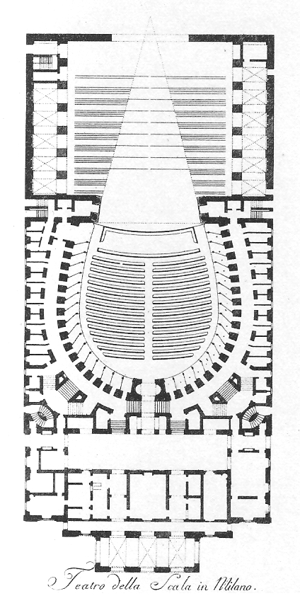 Pianta del Teatro della Scala in Milano